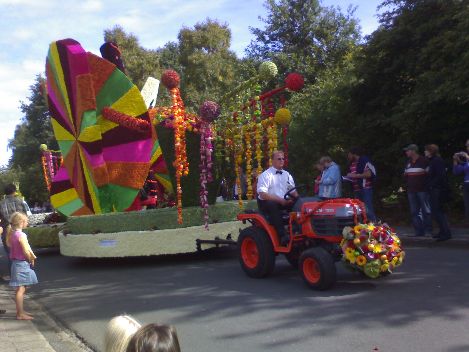 een corsowagen